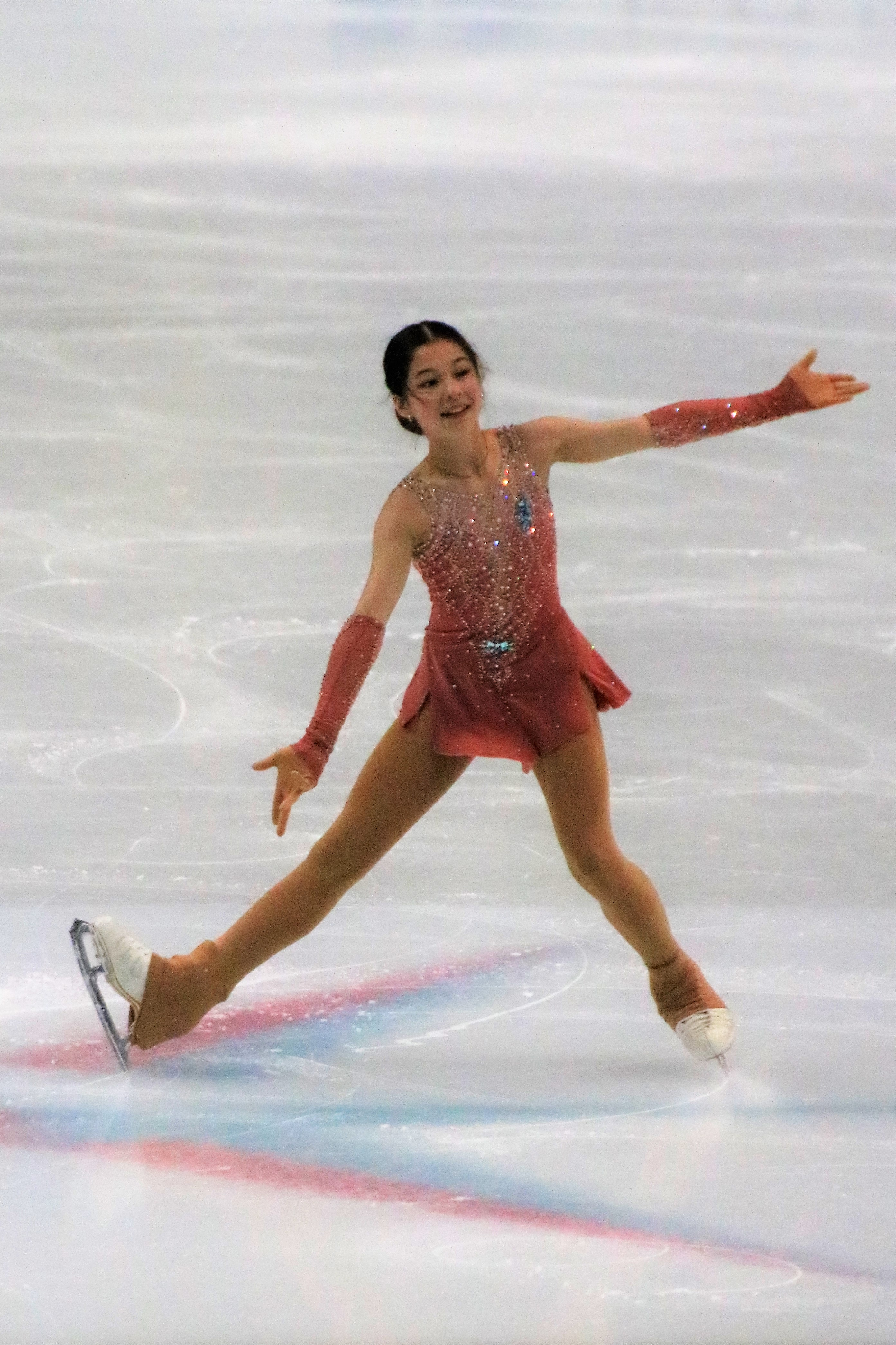 Алиса Лю (США) на финале юниорского Гран-при 2019-2020